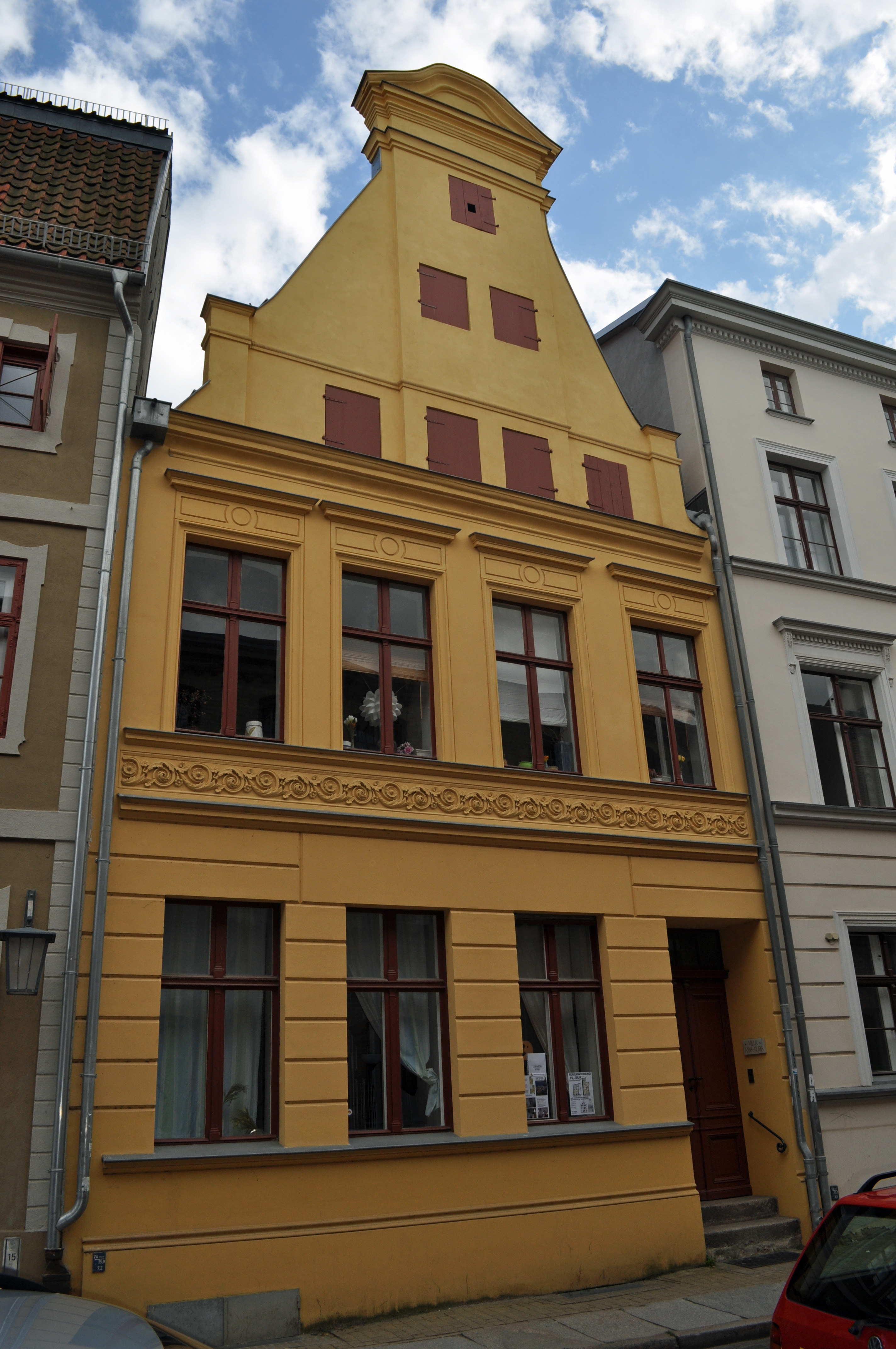 Das Foto zeigt ein Haus (bzw. Details des Hauses) in der Frankenstraße in Stralsund, Deutschland. Die Hausnummer steht im Dateinamen. Aufgenommen am 19. Juli 2011 vom Benutzer:Klugschnacker.